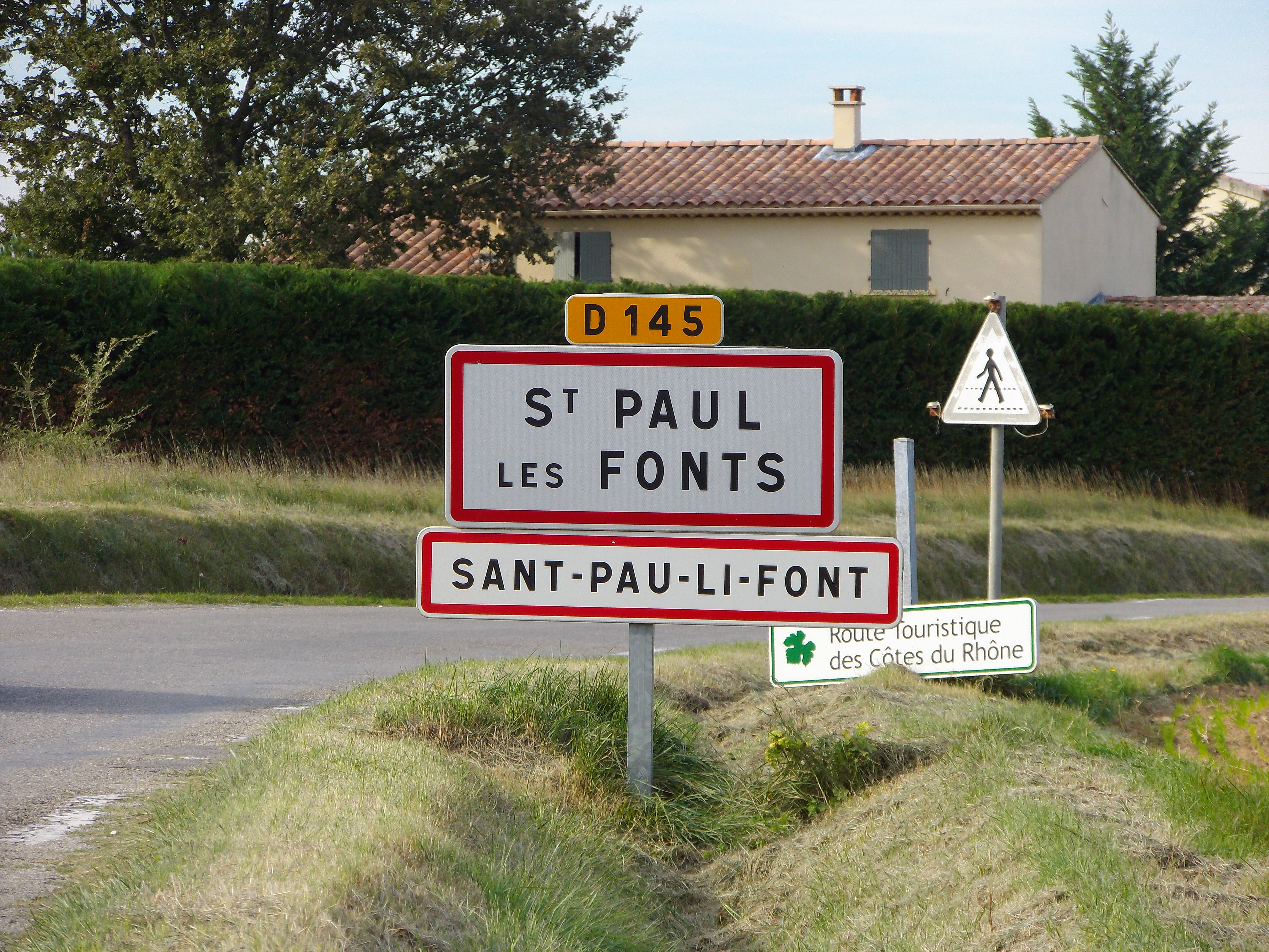 Signalisation bilingue français/provençal à l'entrée de Saint-Paul-les-Fonts (Gard, France).